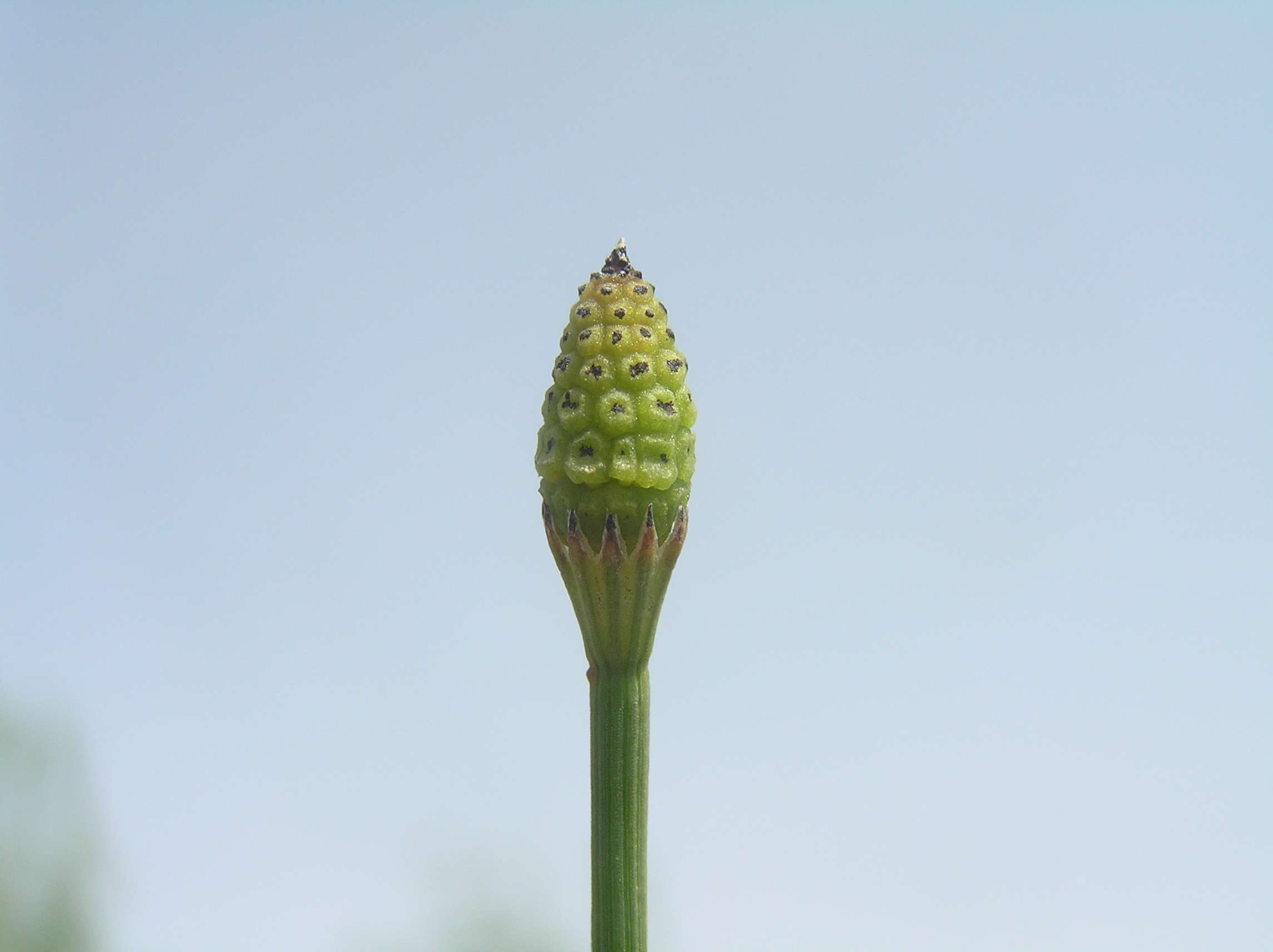 Equisetum ramosissimum, Brno - Židenice, Czech Republic